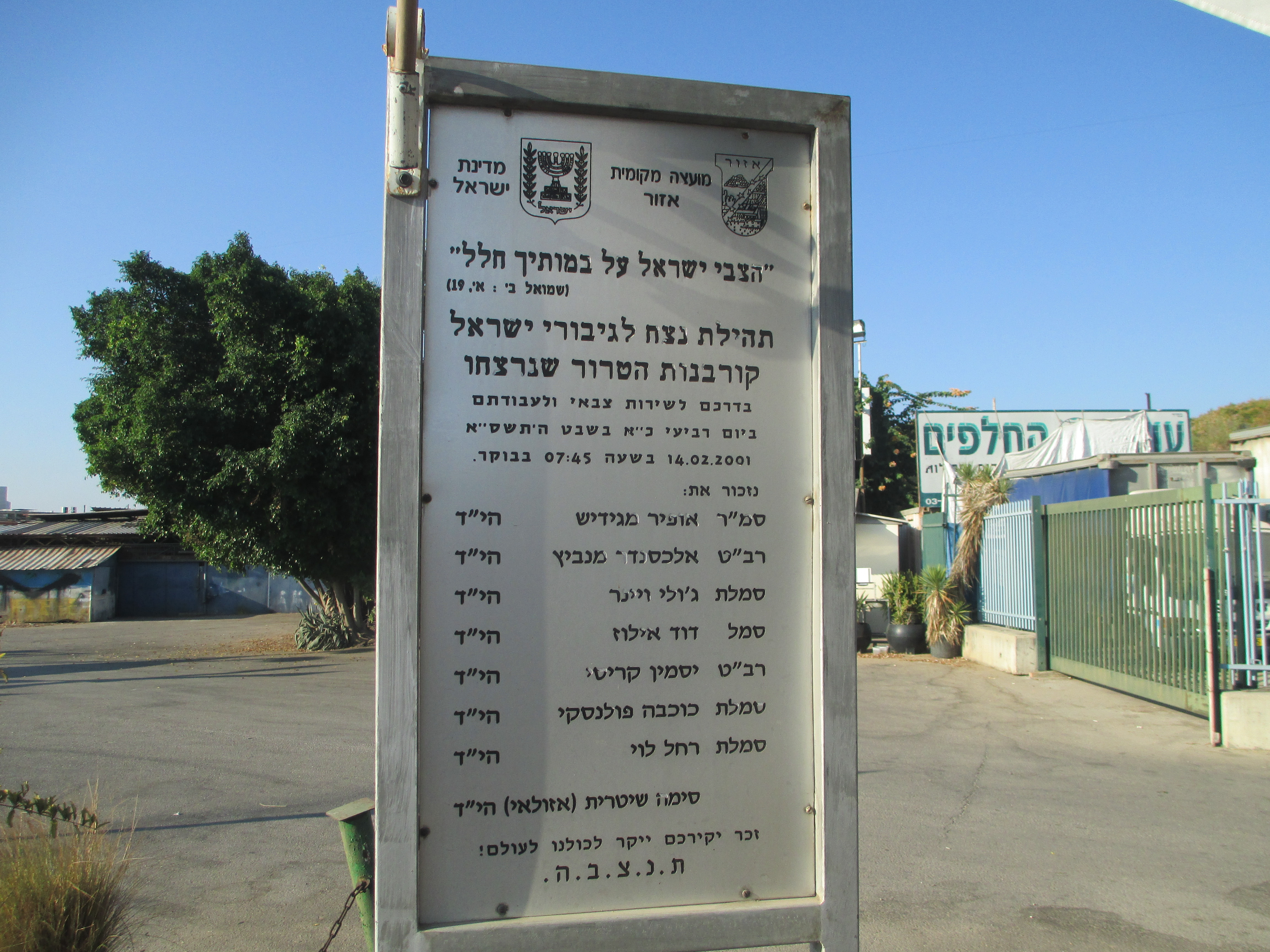 אנדרטה במקום הפיגוע בתחנה באזור ב-2001